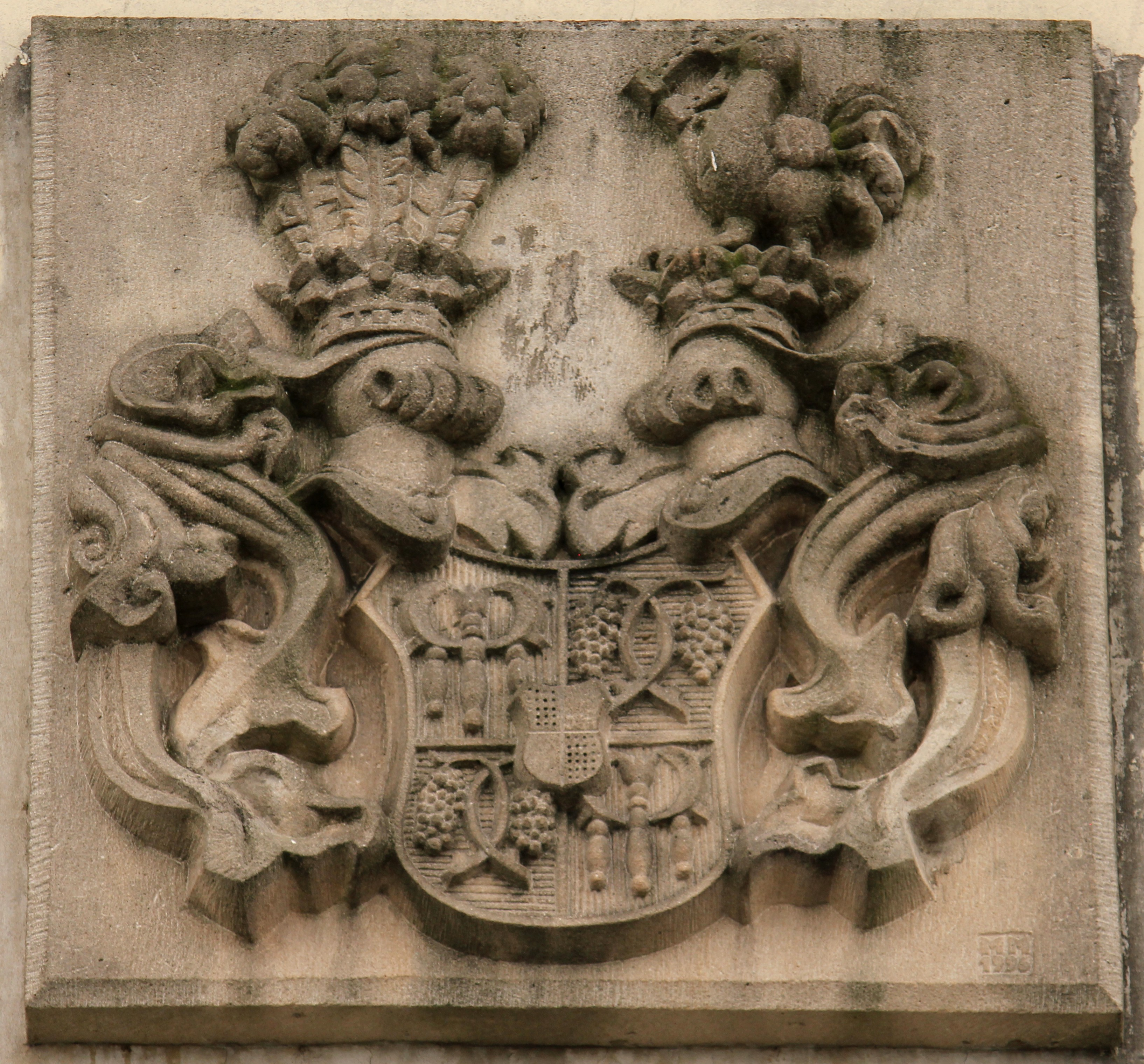 Česky: Kamenný rodový erb Larisch-Mönnichů na přední straně zámku Fryštát v Karviné.